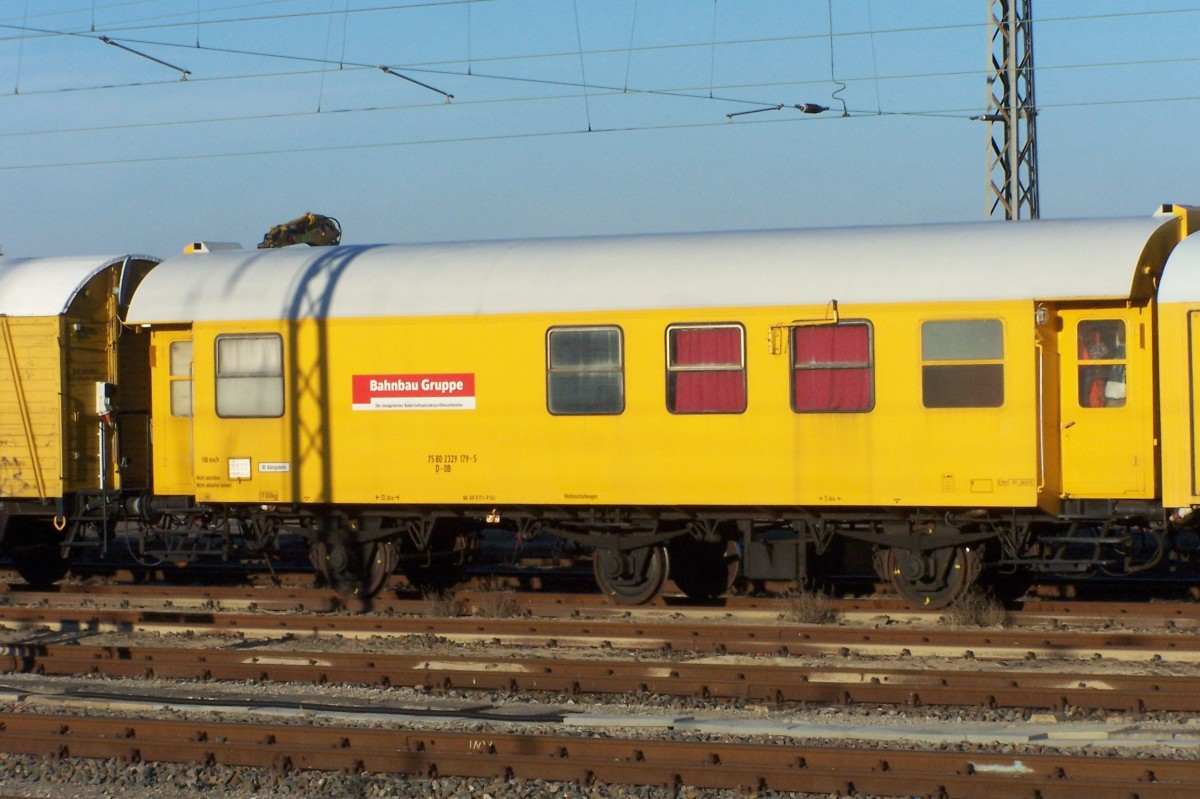 Wohnwagen der DB Bahnbau-Gruppe (75 80 2329 179-5 D-DB), entstanden durch Umbau eines DB-Umbauwagens B3yg (ex preuß. Abteilwagen) durch die DB. Beheimatet in Königsborn bei Magdeburg.